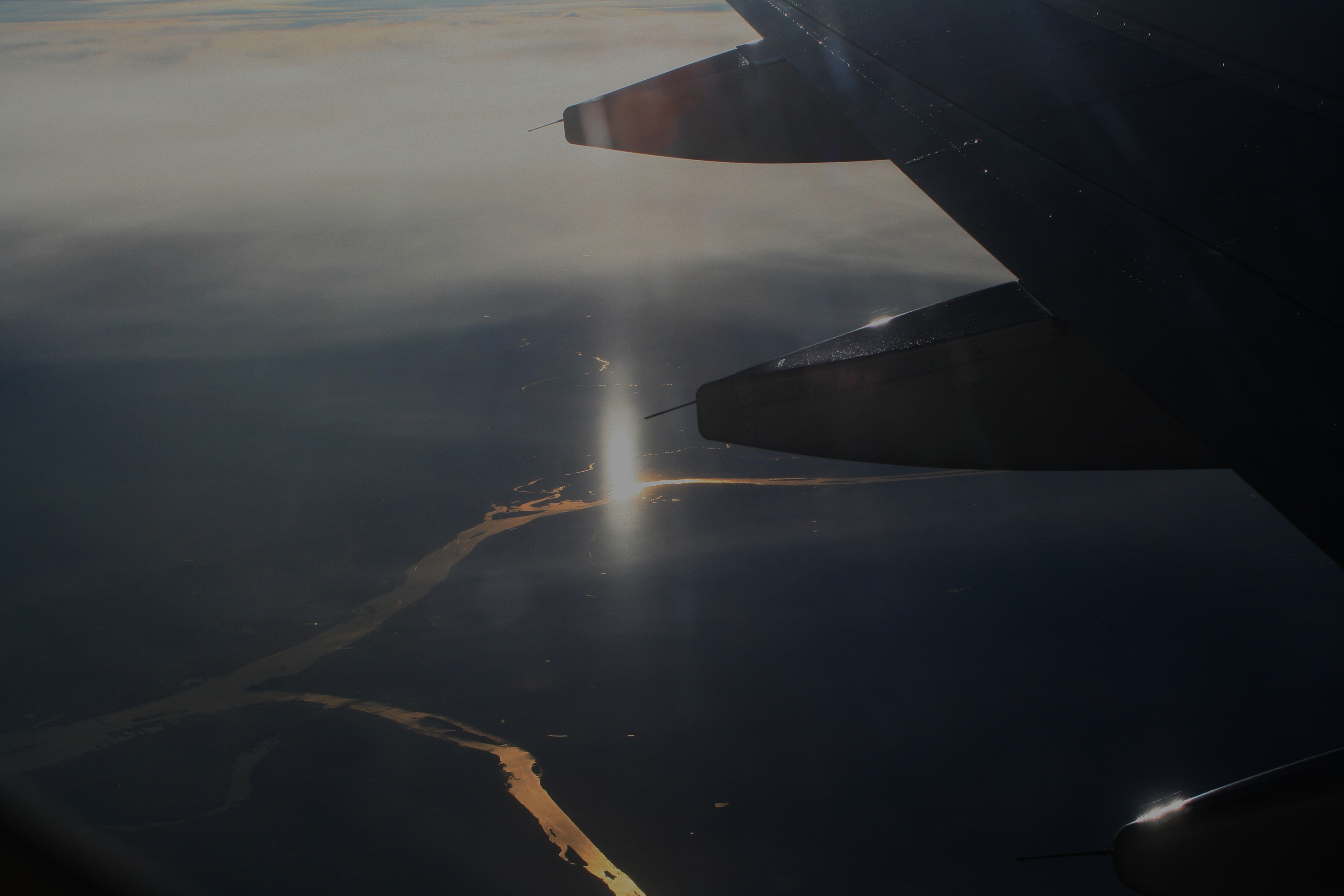 Subsun over Canada